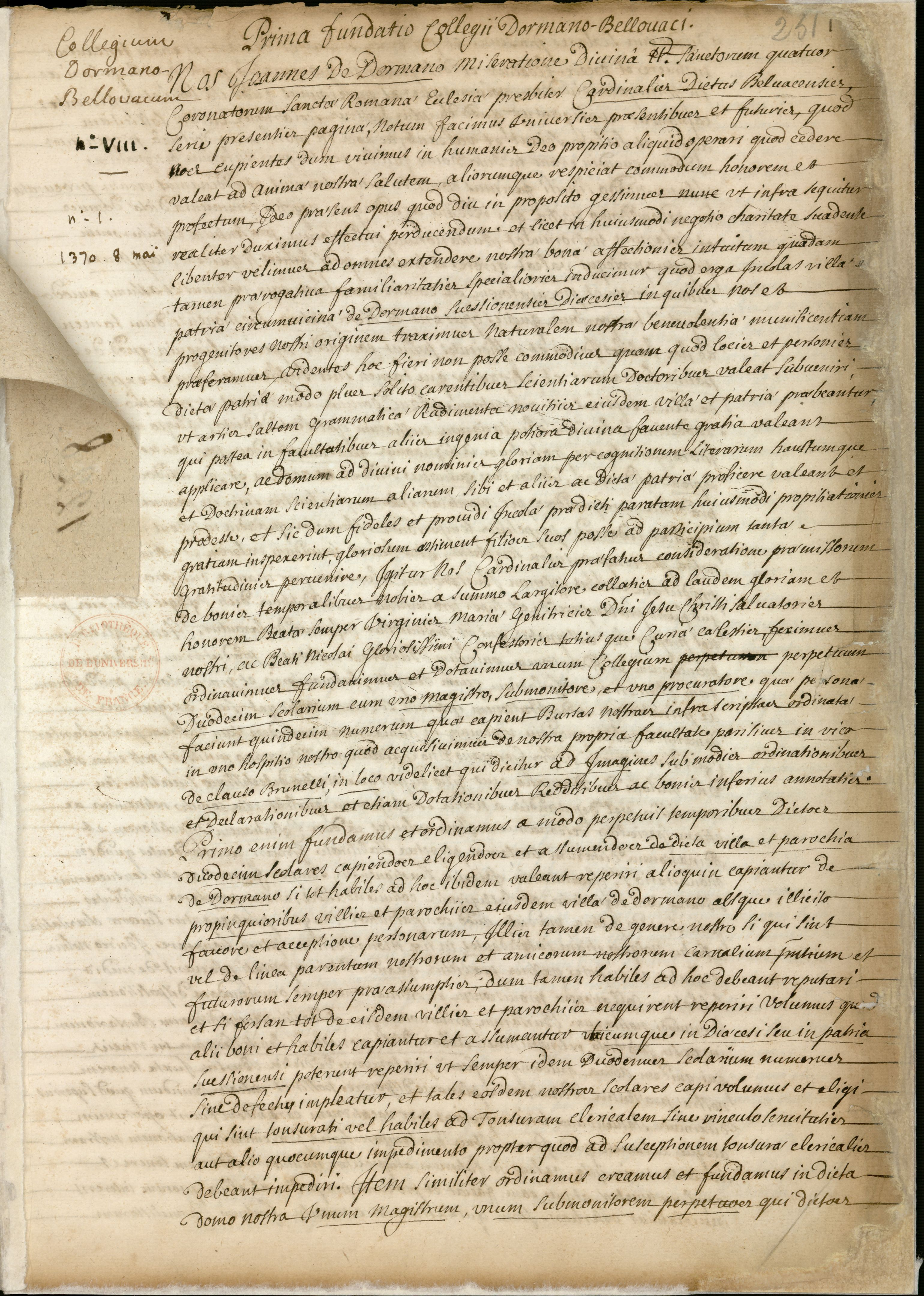 Manuscrit en latin, dans un registre de 738 feuillets consacré aux fondations et statuts des collèges.